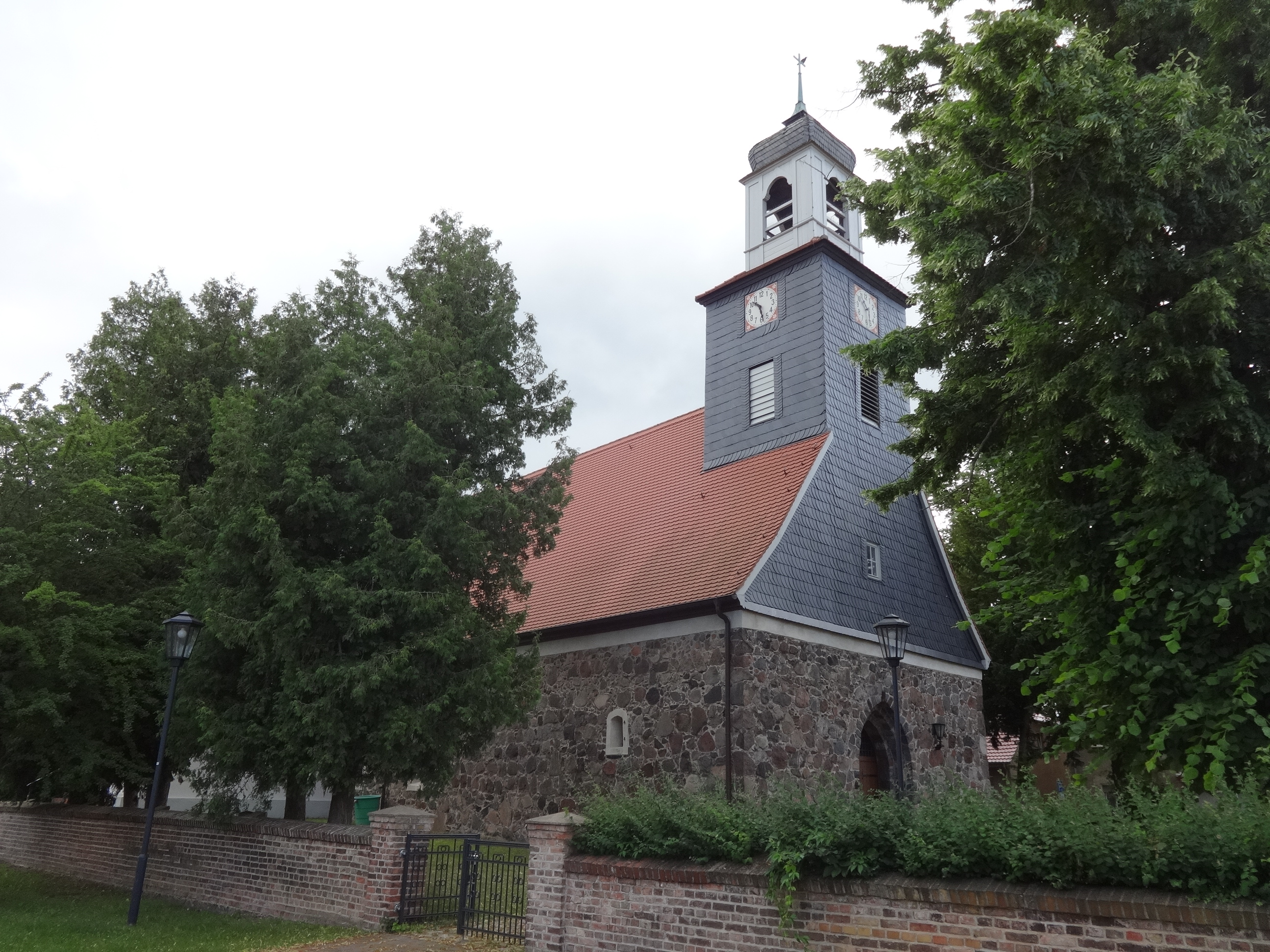 Die evangelische Dorfkirche Schenkendorf entstand vermutlich Ende des 14., Anfang des 15. Jahrhunderts. Die Feldsteinkirche wurde in den Jahren 1662 bis 1669 erheblich umgebaut. In seinem Innern befinden sich ein Altarrtabel und eine Kanzel aus dem 17. Jahrhundert sowie ein Schnitzaltar aus dem Jahr 1516. Er zeigt im geöffneten Zustand die Mondsichelmadonna, während im geschlossenen Zustand Nikolaus von Myra und Apollonia von Alexandria zu sehen sind.